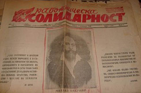 Титулна страница на Анархосиндикалисткия вестник “Работническа солидарност”, с портрет на М. Бакунин